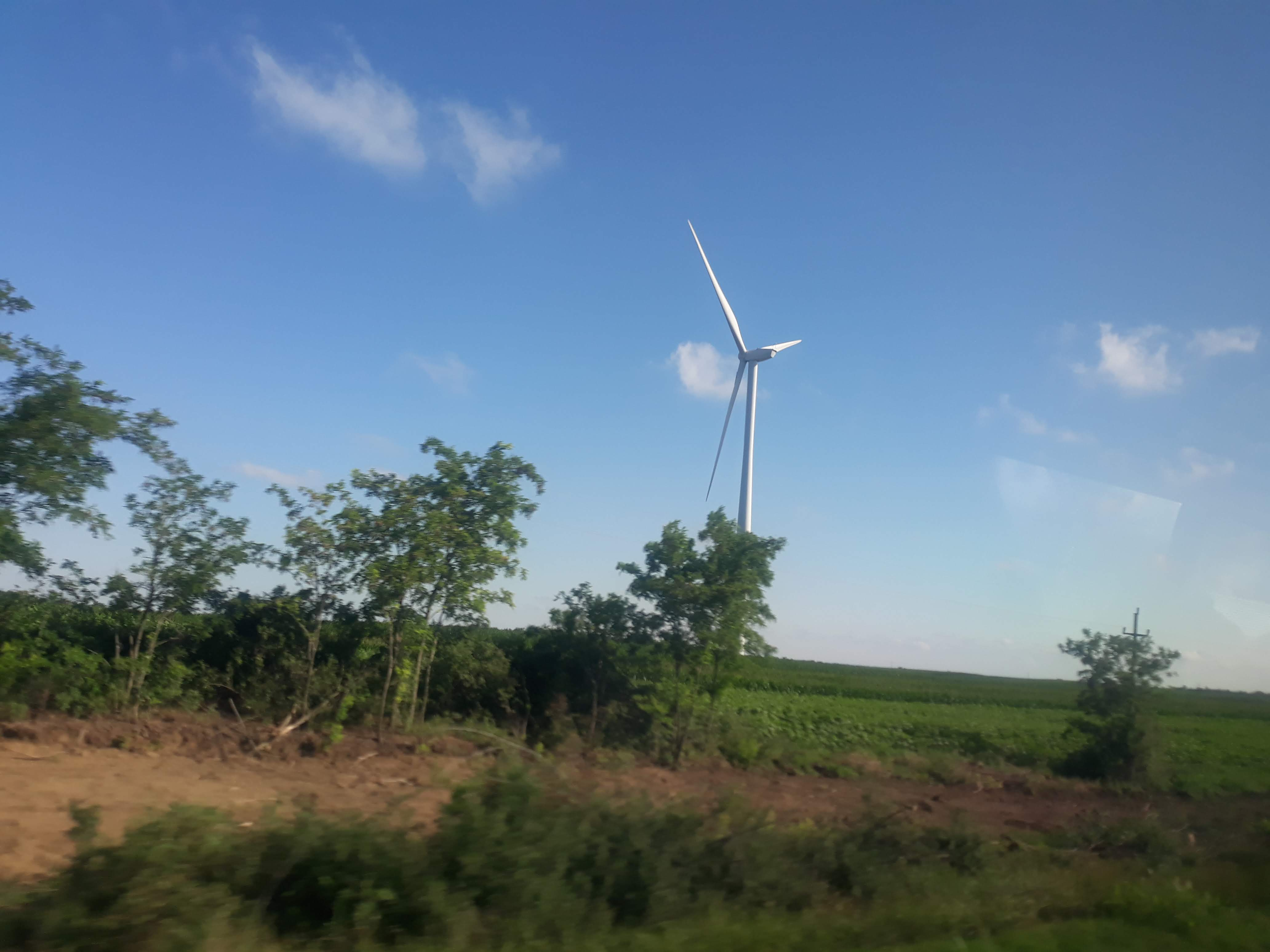 Српски (ћирилица): Ветропарк Чибук 1 Долово